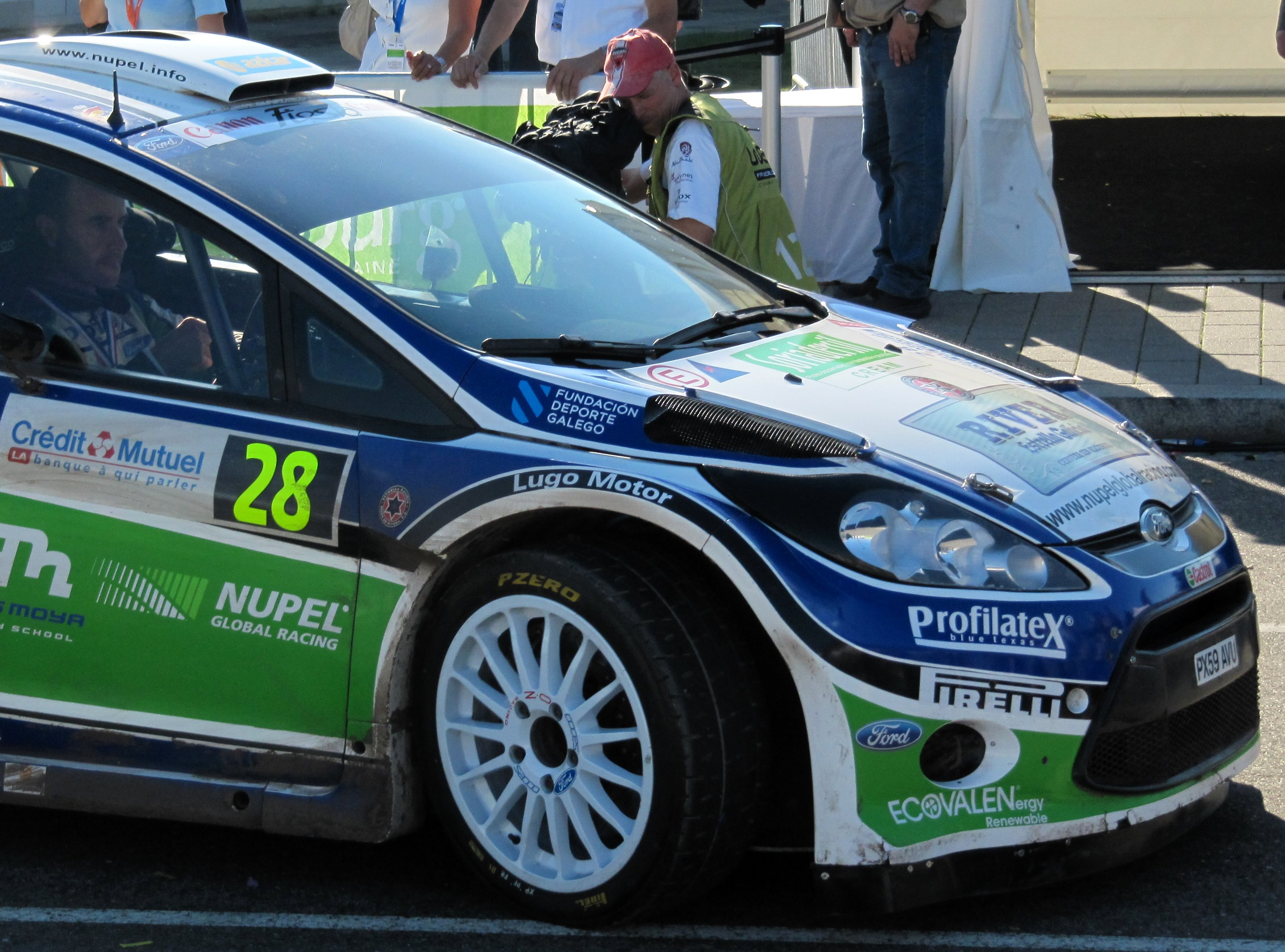 Xavi Pons Rally France-Alsacia 2010